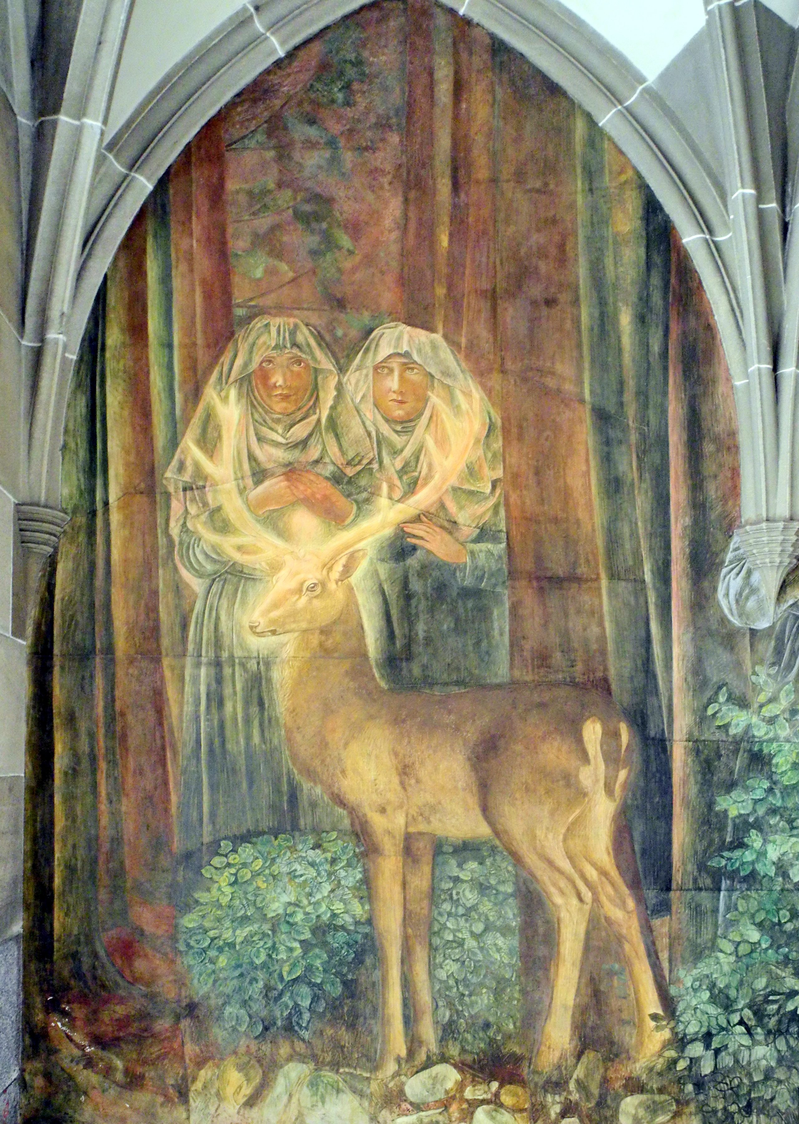 Reformiertes Fraumünster mit Kreuzgang